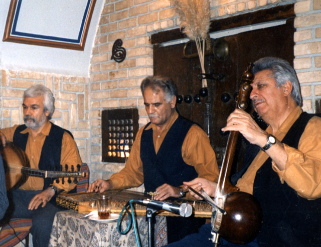 Musiciens iraniens.scanné d'une photo prise par et récupéré de la WP anglophone.